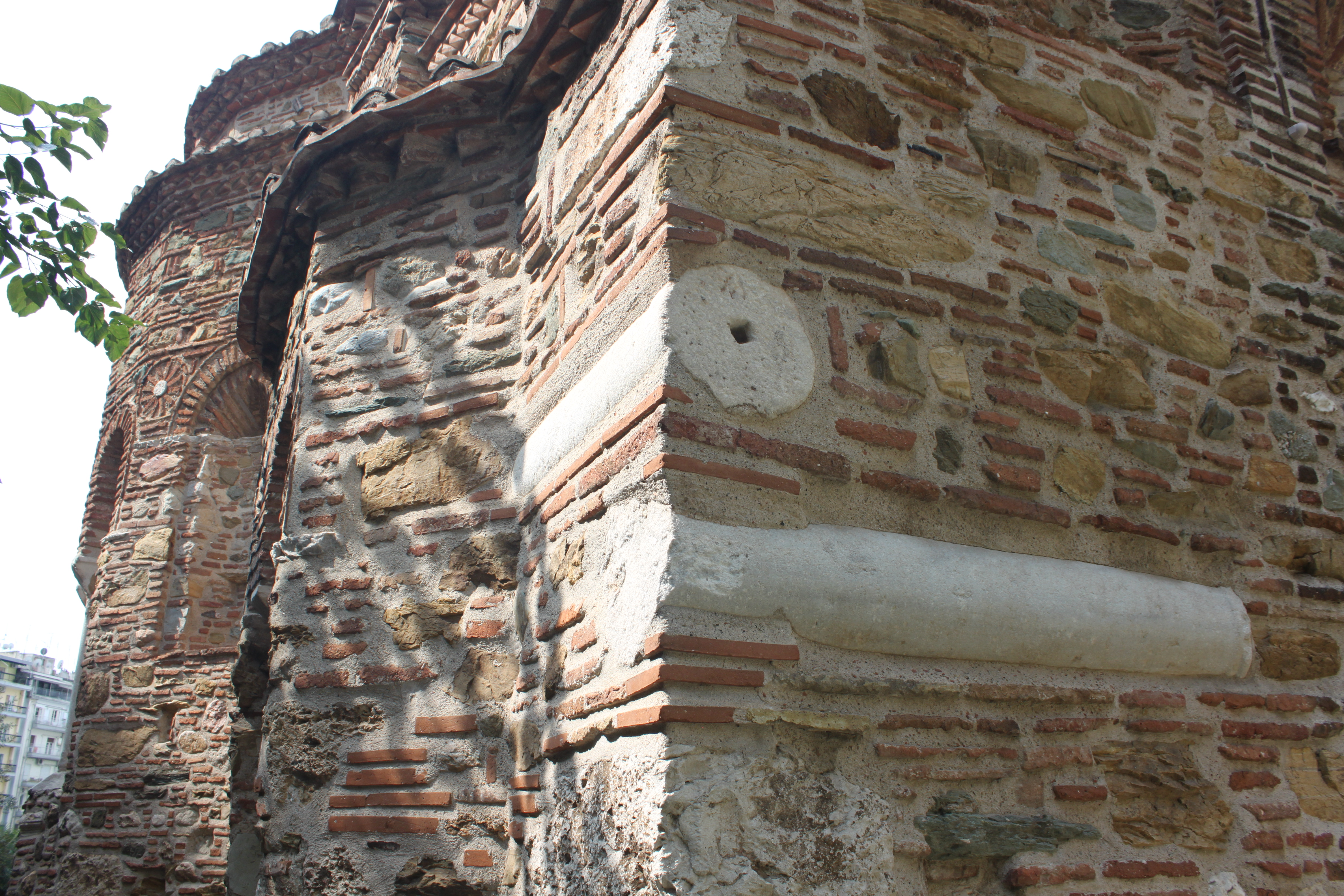 Fragments de colonnes à l'angle nord-est de l'église Saint-Pantaléon de Thessalonique